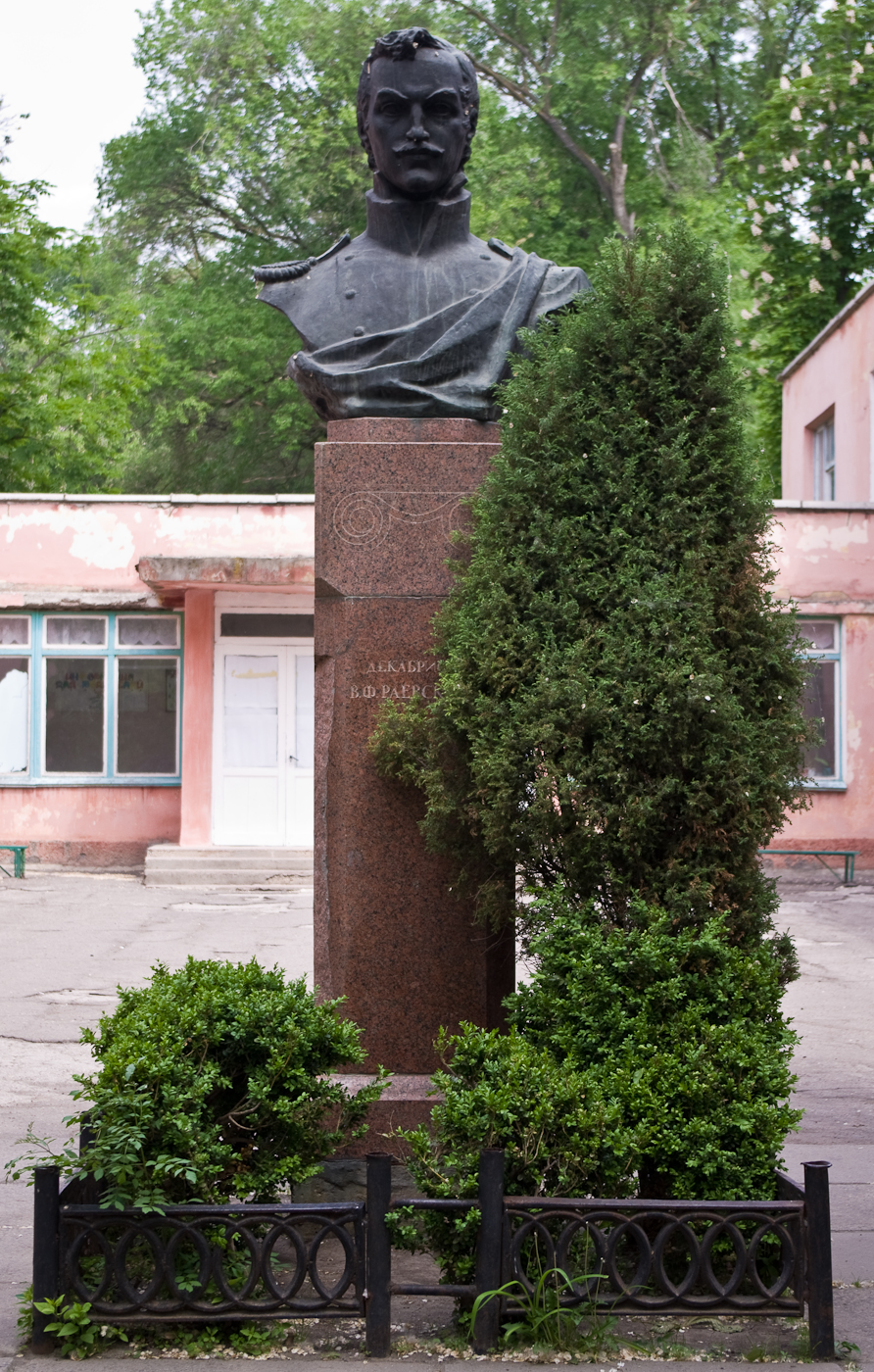 Памятник Владимиру Федосеевичу Раевскому в Тирасполе